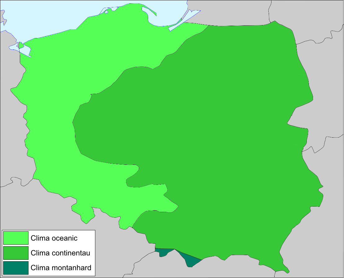 Esquèma climatic de Polonha.